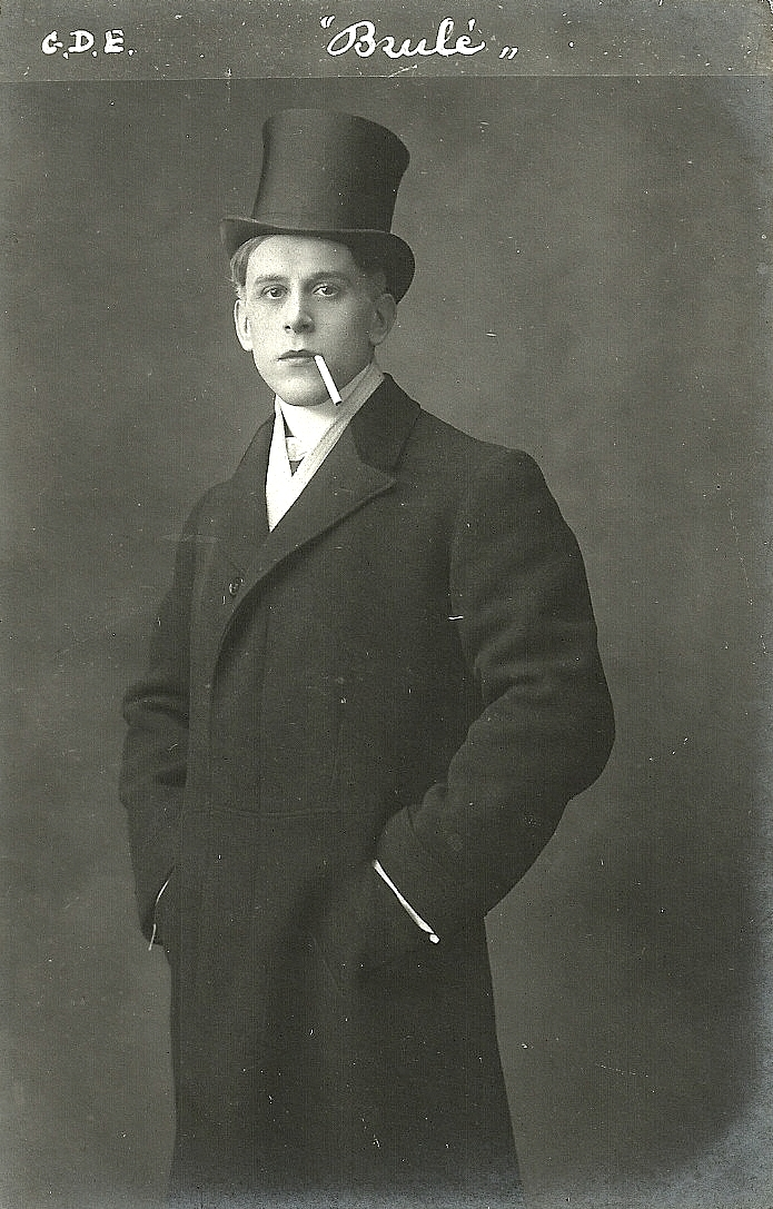 Photographie d'André Brulé.